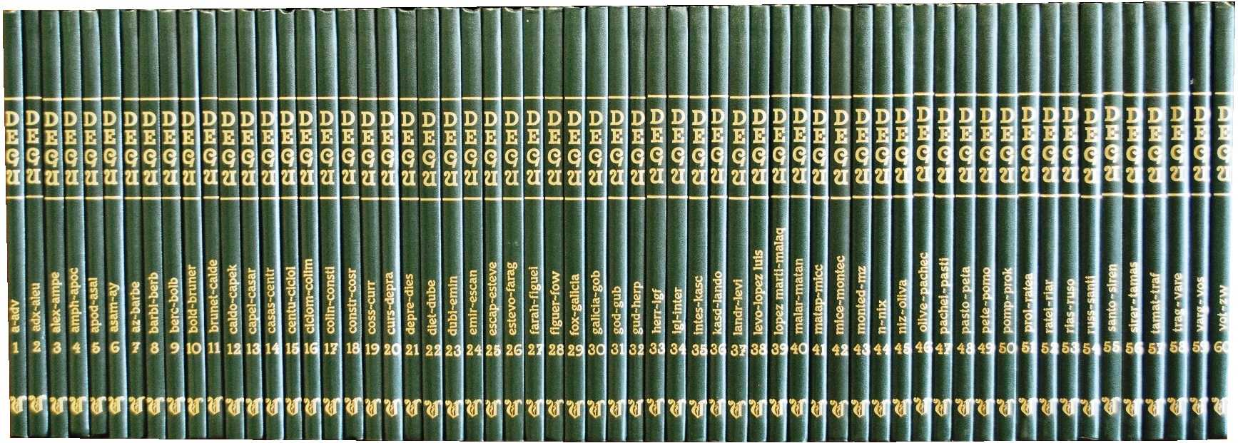 Diccionario Enciclopédico Galego Universal, DEGU, ed. Ir Indo para La Voz de Galicia, 2003